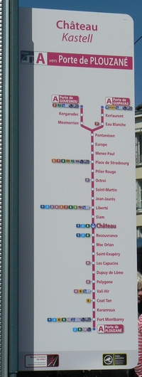 Ligne tram A Brest